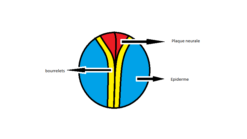 Schéma représentatif d'une fin de neurulation sur un œuf hétérolécithe.